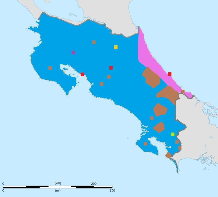 Primera edición del mapa lingüístico de Costa Rica. Leyenda: Español. (hablado en todo el país) Inglés criollo limonense. Inglés cuáquero. Idiomas indígenas. Chino. Italiano cotobruseño. Alemán sarapiqueño. Escala: 1:14.816.000 (precisión: cerca de 3,7 km)